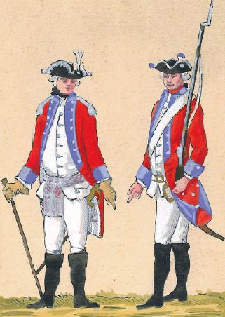 42. Regiment Pieszy (Raczyńskiego)